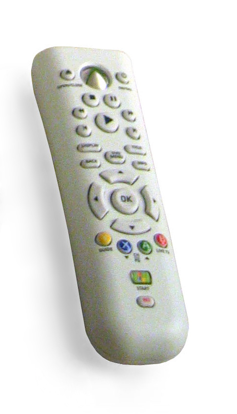 Xbox 360 remote